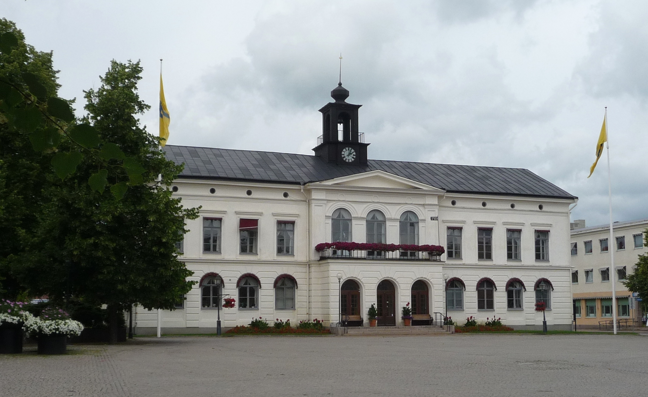 Rådhuset i Köping. Uppfört 1875-77 i timmer. Arkitekt Johan Adolf Haverman efter berarbetning och nedbantning av ett tidigare förslag av Johan Fredrik Åbom, som 1870 gjorde ritningar till ett stadshus i sten. Västra flygeln tillbyggdes 1892. 1907 gjordes inre ändringar i Rådhuset. 1925-26 genomfördes en stor yttre och inre ombyggnad efter arkitekten Erik Hahrs ritningar.